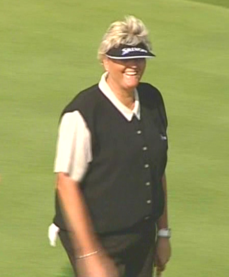 Bildbeschreibung: Laura Davies bei der LET Siemens Ladies Open 2006, GC Föhrenwald, Wiener Neustadt Quelle: eigene Aufnahme mit einer Handycam Fotograf/Zeichner: Boss 09:41, 29 September 2006 (UTC) Datum: September 2006 Sonstiges: GNU